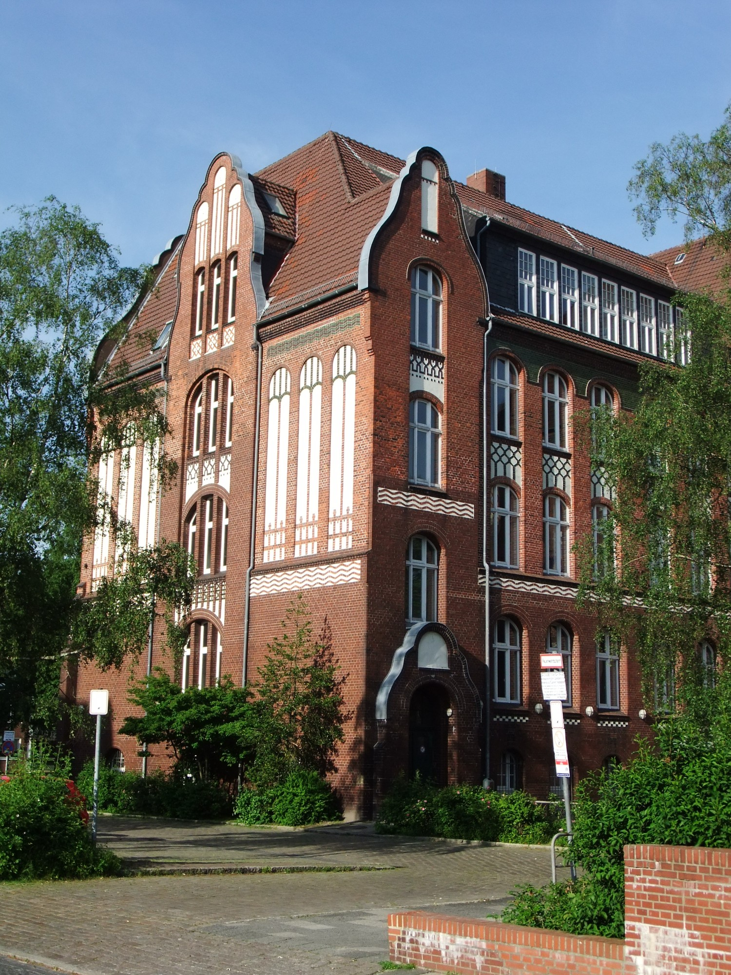 Reform-Real-Gymnasium Geestemünde, Raabe-Schule in Bremerhaven, Friedrich-Ebert-Straße 10.